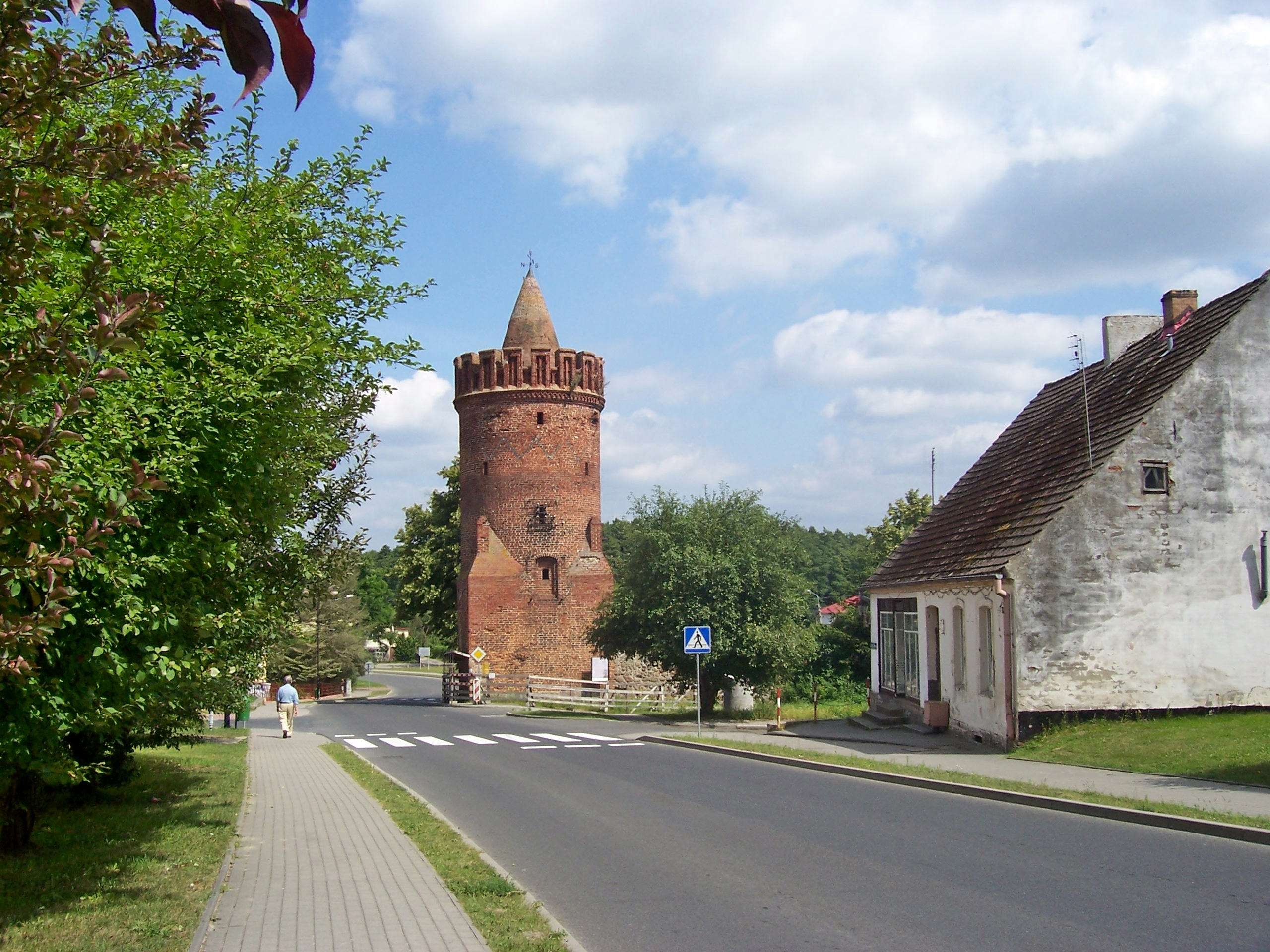 RECZ